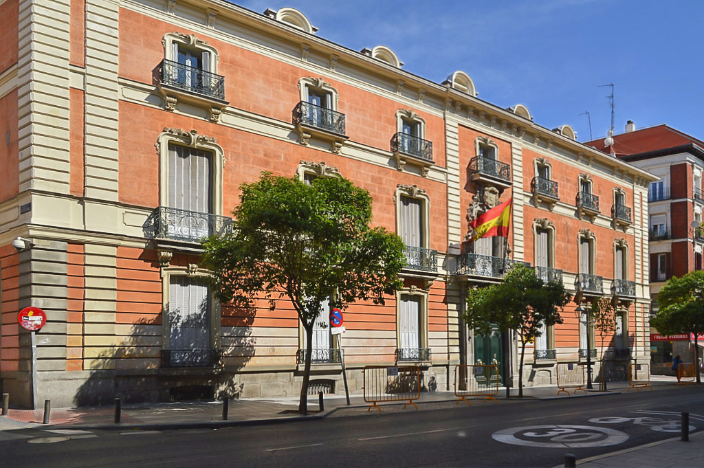 Palacio de Parcent, actualmente dependencias del Ministerio de Justicia, calle San Bernardo 62, Madrid.